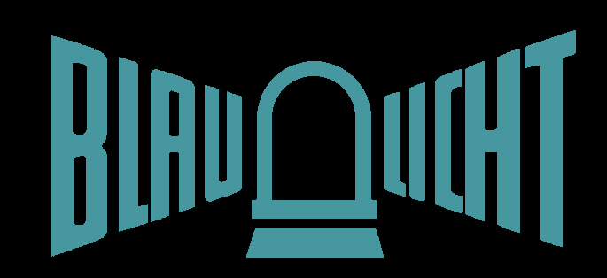 Logo alt